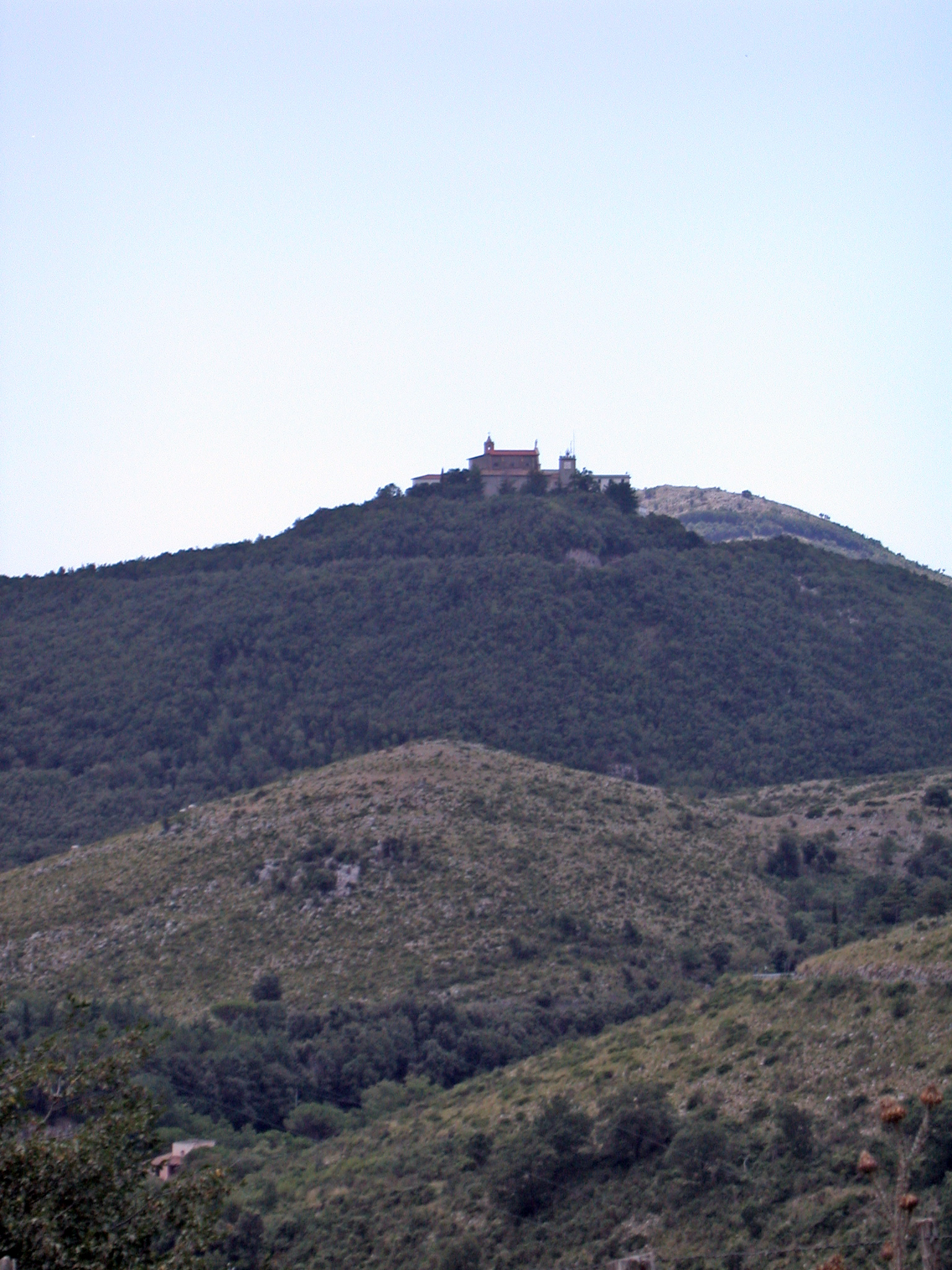 Itri, provincia di Latina, regione Lazio, Italia. Santuario della Madonna della Civita (monte Civita) dalla strada verso Campodimele.